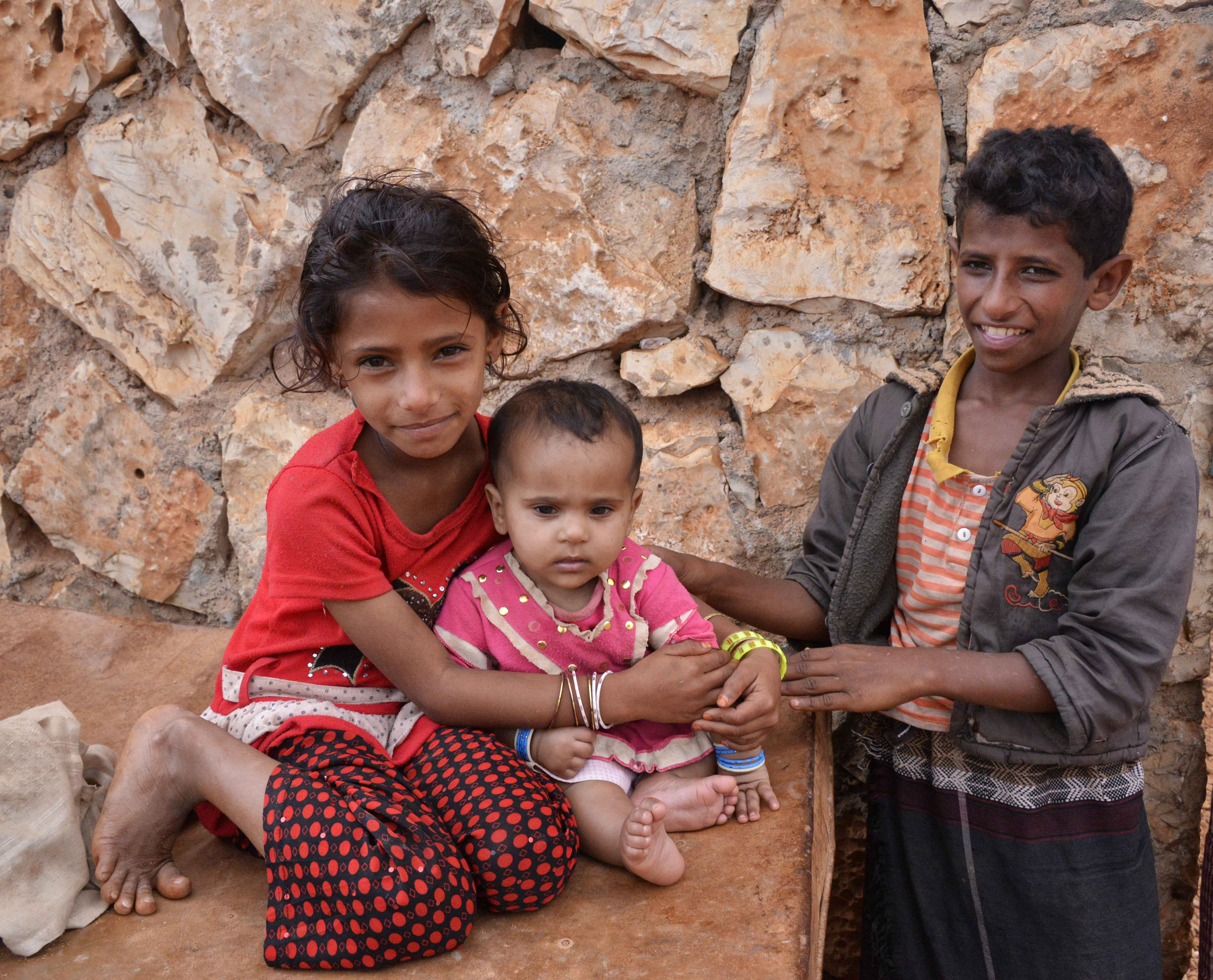 Socotri Children, Socotra Is